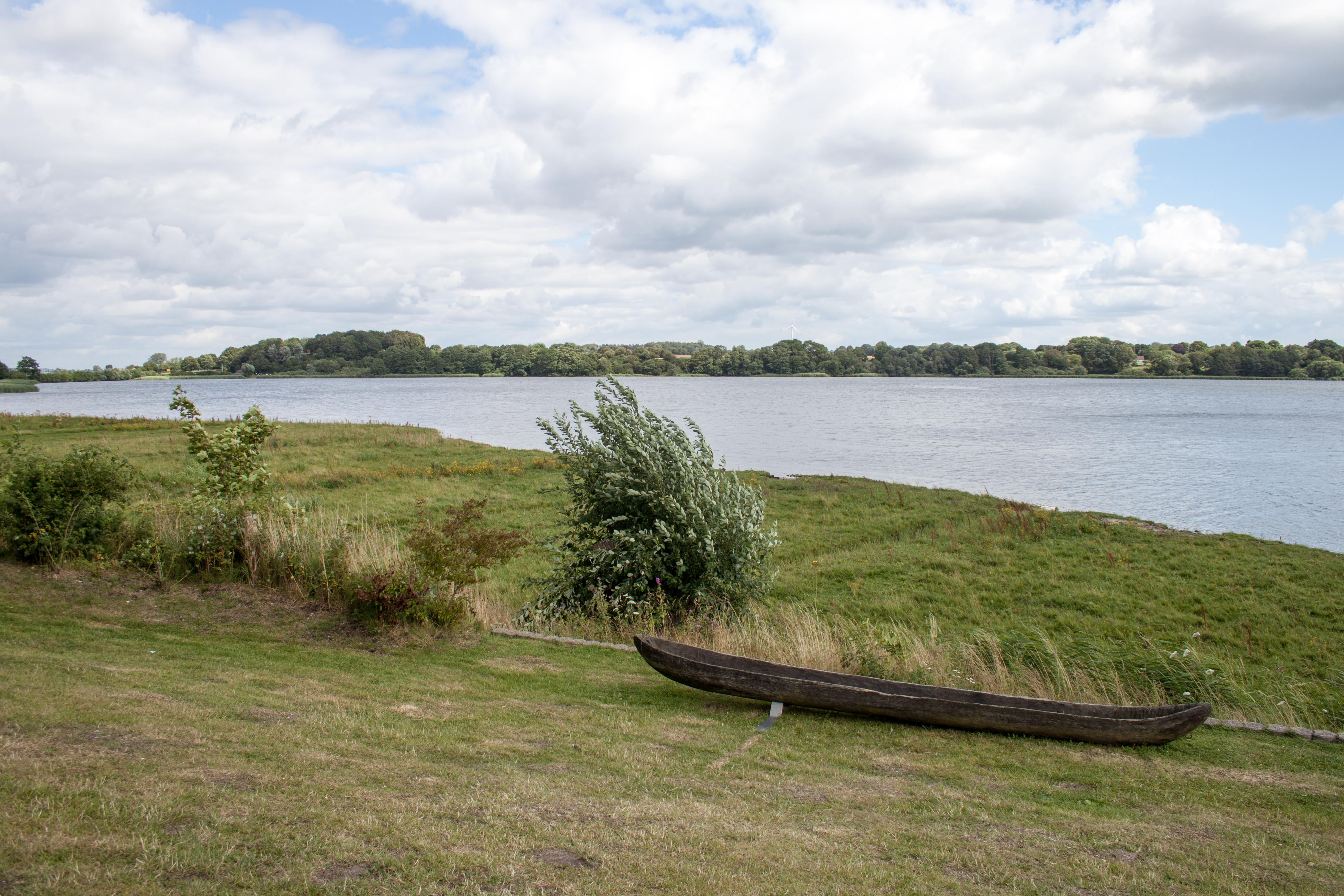 Hedeby, Haddeby Noor